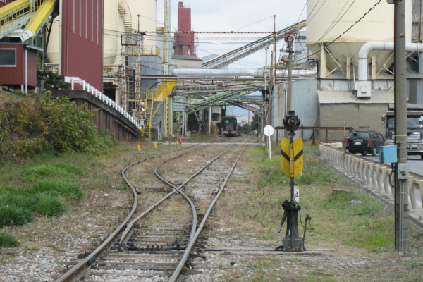 西濃鉄道市橋線の乙女坂駅。奥で列車への荷役作業が行われている。2007年12月に投稿者撮影。